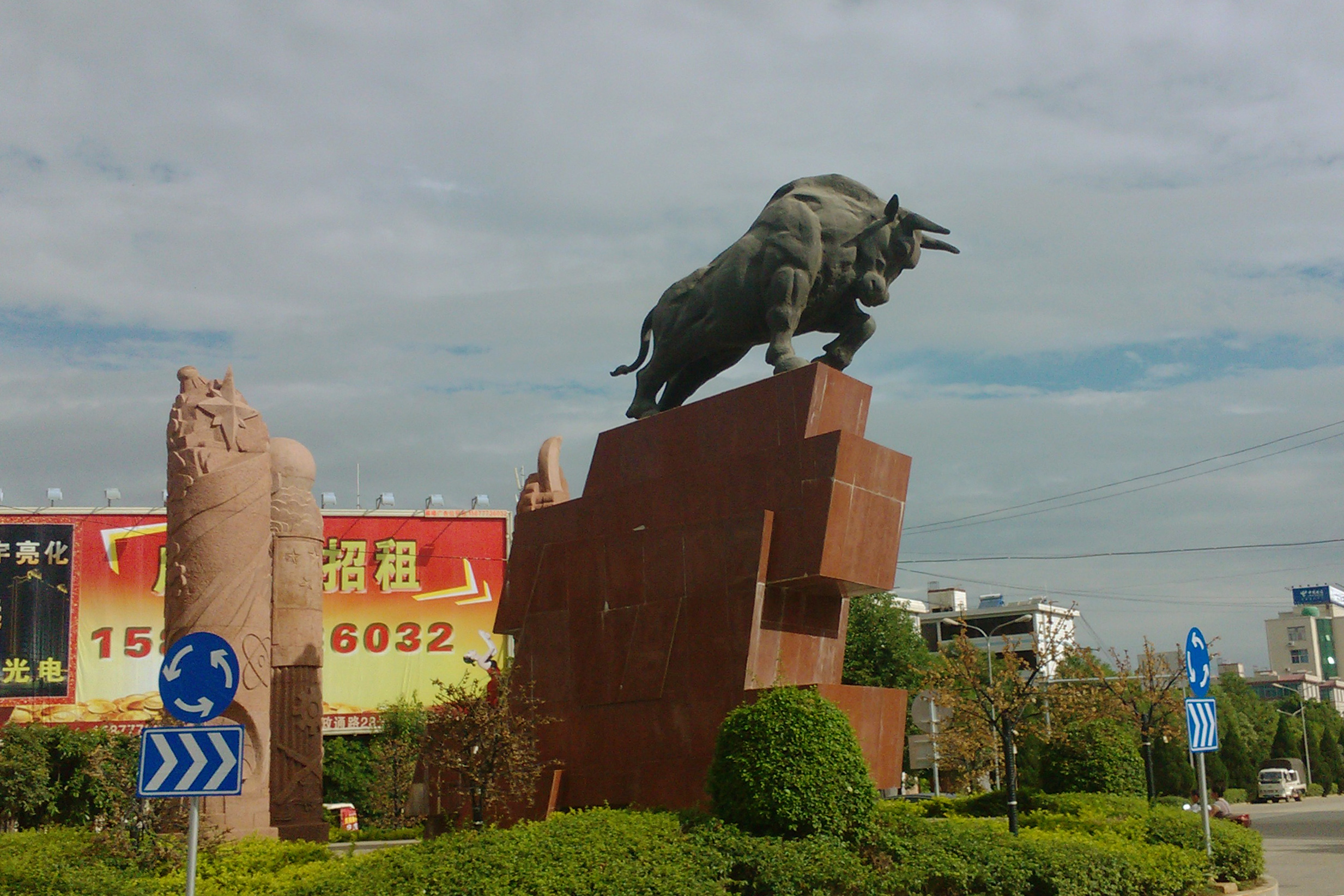 中国云南省宾川县金牛镇